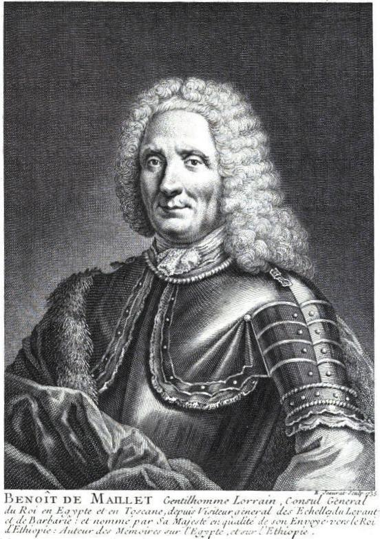 "Benoît de Maillet. Gentilhomme Lorrain, Consul général du Roi en Egypte et en Toscane, depuis Visiteur général des Echelles du Levant et de Barbarie, et nommé par Sa Majesté en qualité de son Envoyé vers le Roi d'Ethiopie. Auteur des Mémoires sur l'Egypte et sur l'Ethiopie."